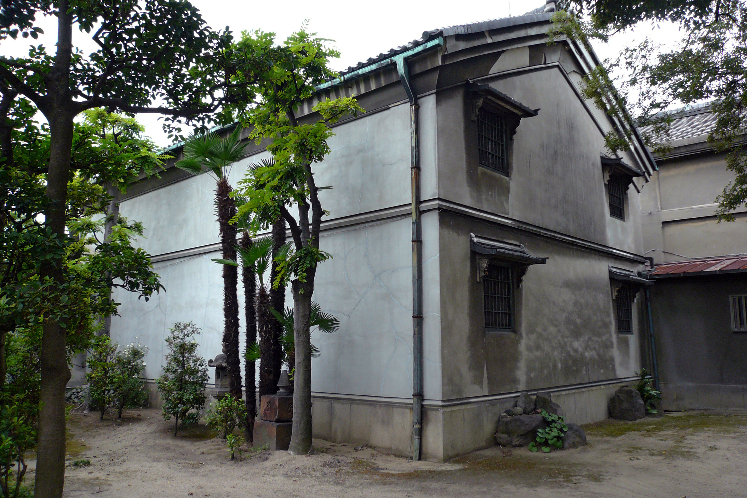 Fujita Museum in Osaka, Osaka prefecture, Japan